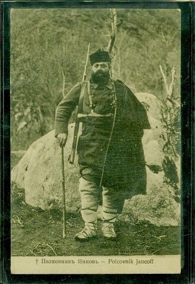 ο αντισυνταγματάρχης του Βουλγαρικού Στρατού Αναστάς Γιασγκώφ